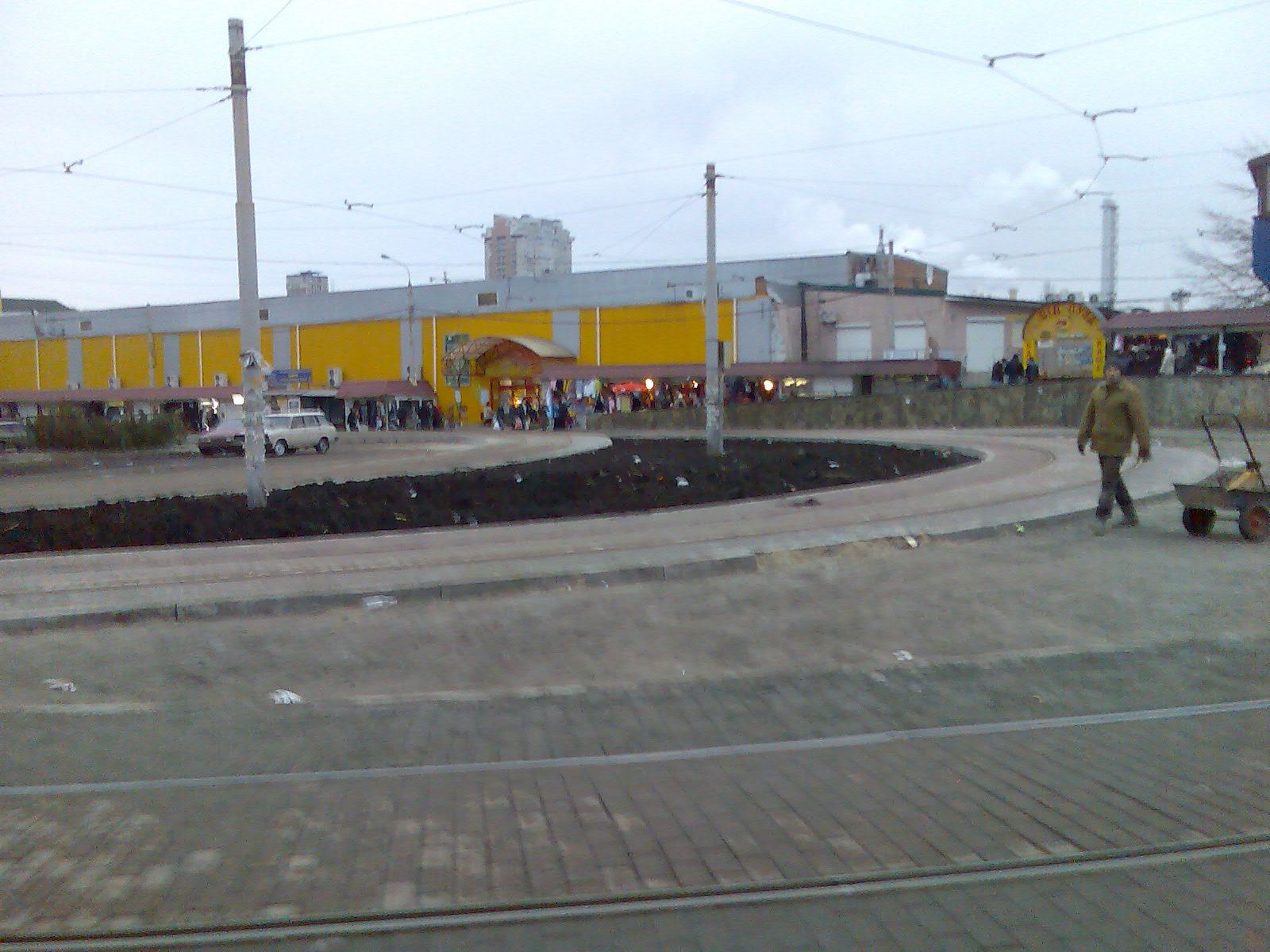 Киев. Конечная остановка трамваев №1 и №3 «Улица Старовокзальная»